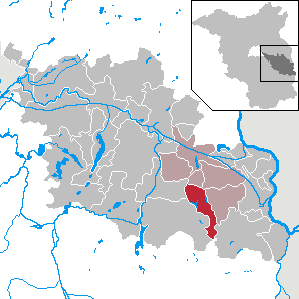 Grunow-Dammendorf in Brandenburg (Country) - District Oder-Spree